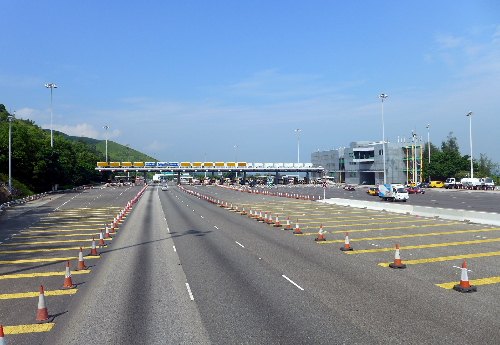 Lantau Link Toll Plaza